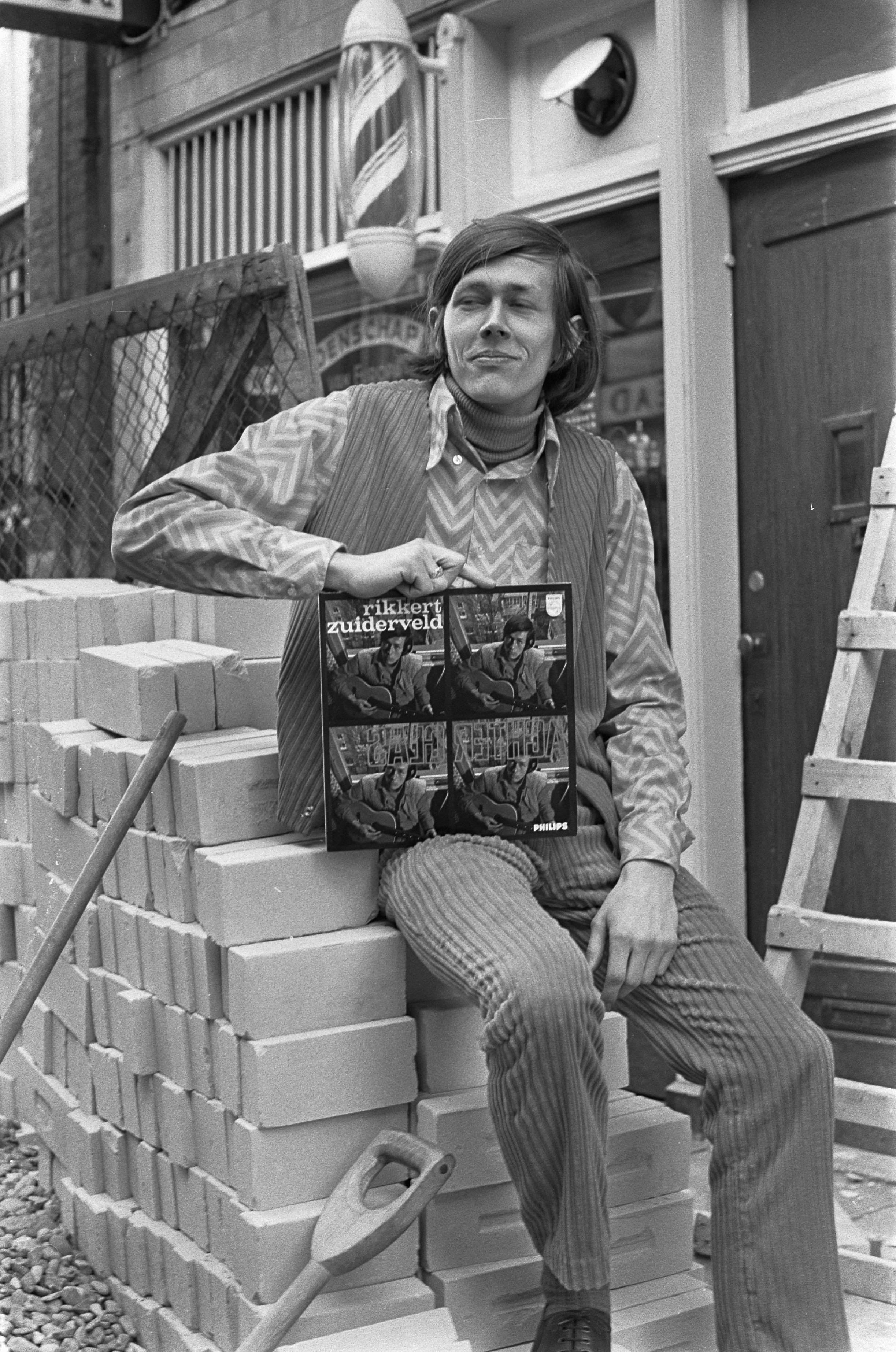 Rikkert Zuiderveld heeft nieuwe langspeelplaat Datum 5 april 1967